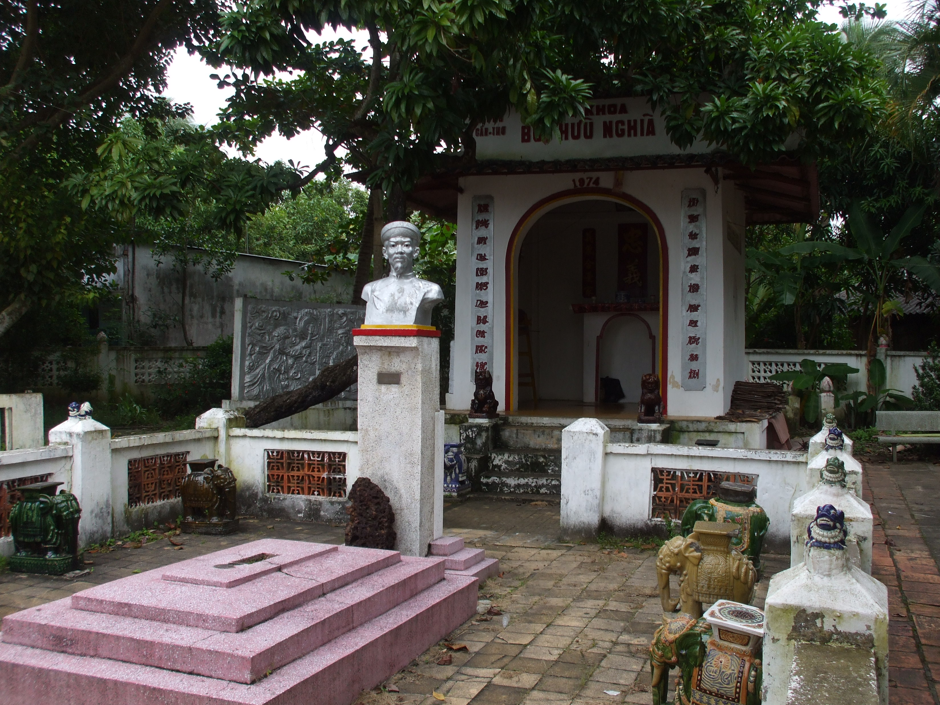 Mộ và đền thờ Bùi Hữu Nghĩa (Bui Huu Nghia’s tomb and temple)